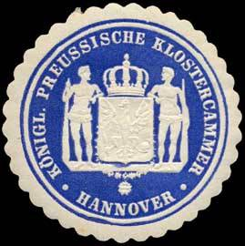 Sealing stamp Title: Königlich Preussische Klostercammer - Hannover Description: blau, weiß, geprägt Place: Hannover size: 4 cm